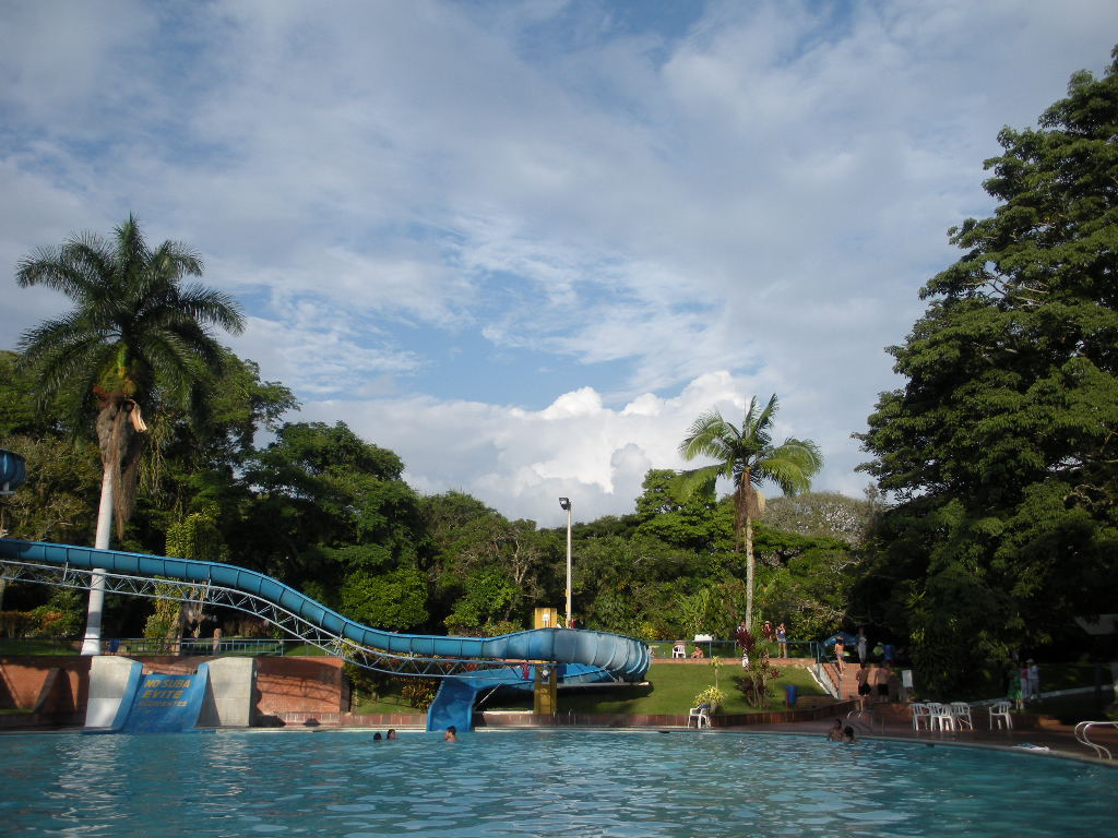 Club El Bosque - Silvania - Cundinamarca - Colombia S.A.